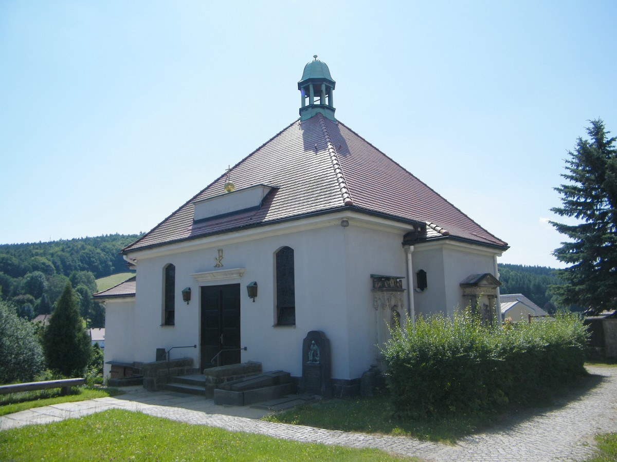 Hřbitovní kaple u kostela Nanebevzetí Panny Marie v Schirgiswalde